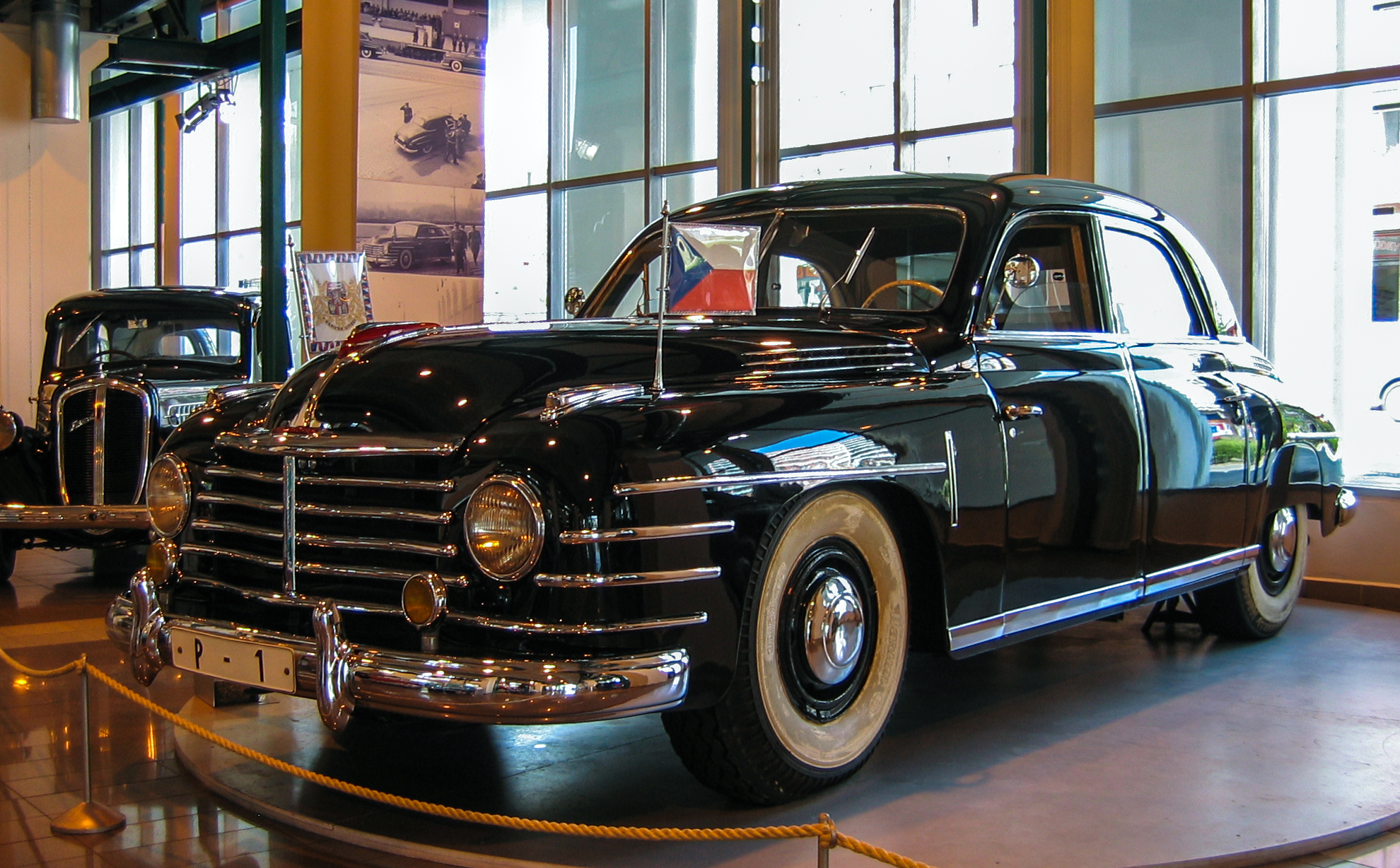 Škoda VOS-L im Museum in Mlada Boleslav, Viertakt-Ottomotor von PRAGA, 5190 cm³, 110 kW bei 4000 /s, Getriebe 4+1, Höchstgeschwindigkeit 115 km/h